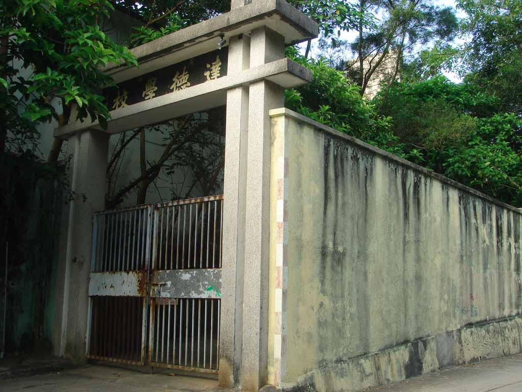 中文（香港）: 達德學校。